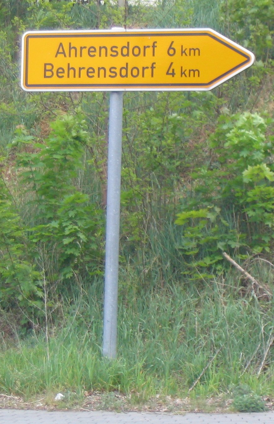 Wegweiser in Wendisch Rietz zu den Nachbarorten Ahrensdorf und Behrensdorf